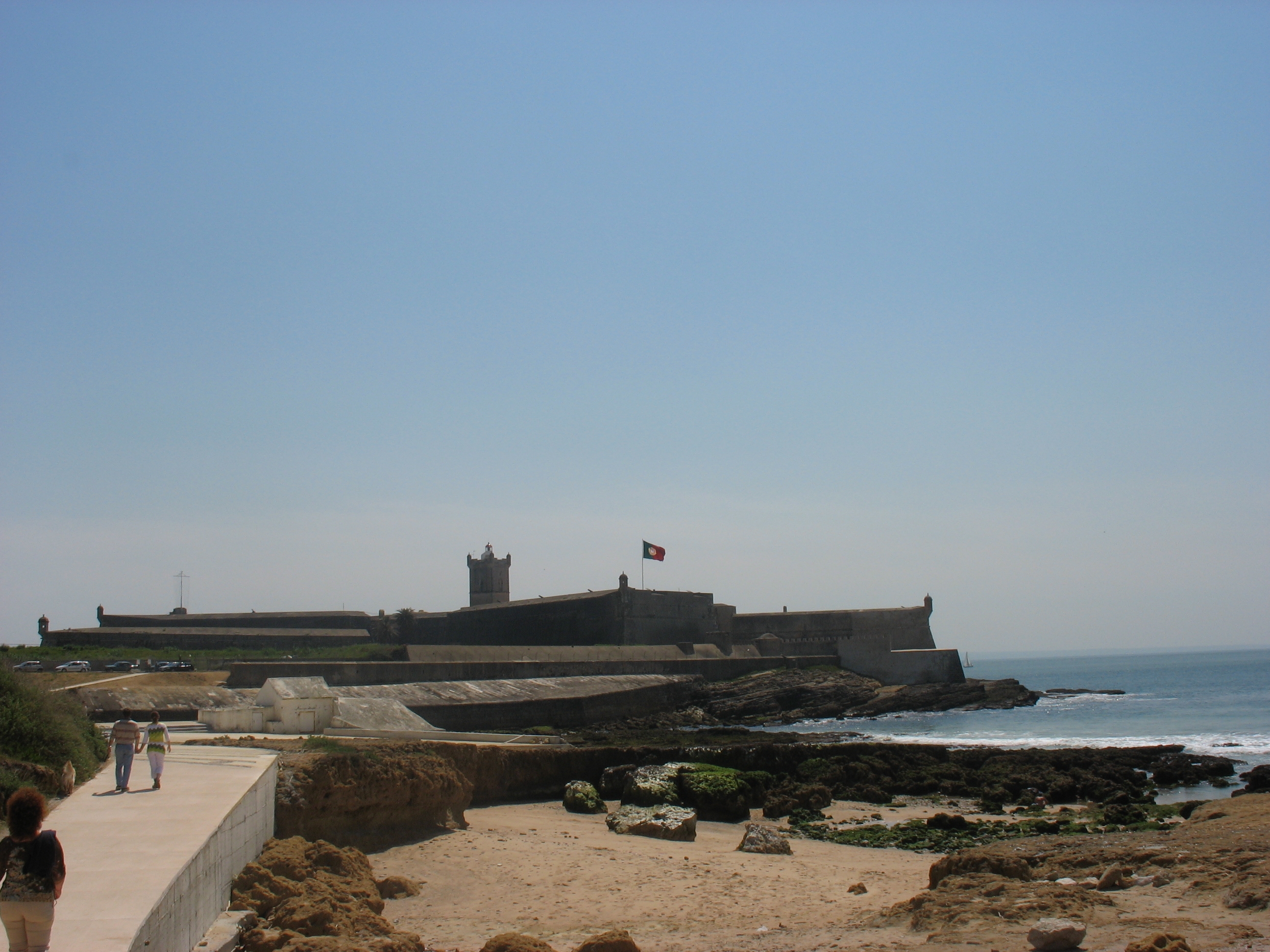 Fortress of São Julião da Barra, Oeiras, Portugal